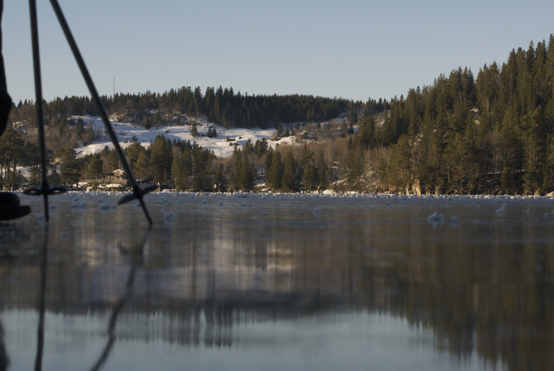 Jonsvatnet winter